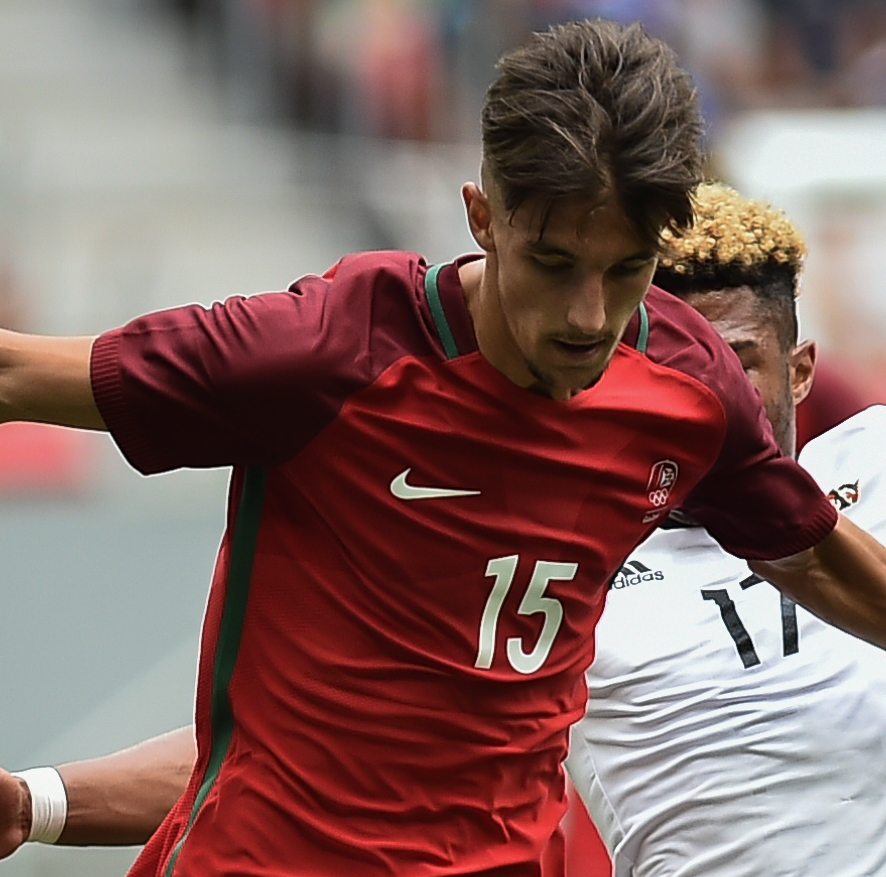 Estádio Nacional de Brasília Mané Garrincha, Brasília, DF, Brasil, 13/8/2016 Foto: Andre Borges/Agência Brasília Portigal e Alemanha jogam neste sábado (12), no Estádio Mané Garrincha, pelas quartas de final do futebol masculino nas Olimpíadas 2016.